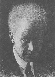 František Kobliha (1877-1962), český malíř, grafik a uměnovědec